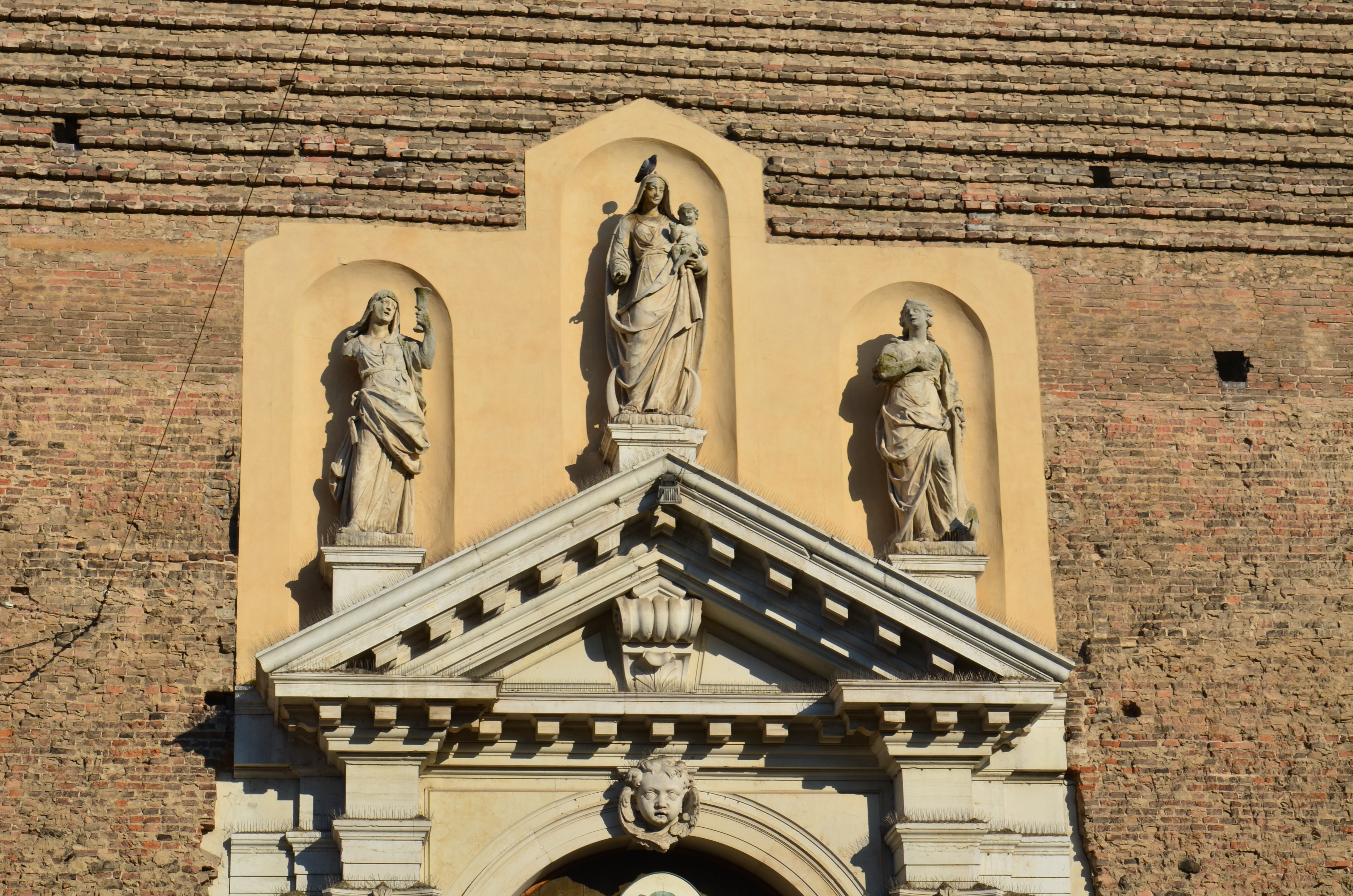 Padova - Basilica del Carmine Statue della faccita